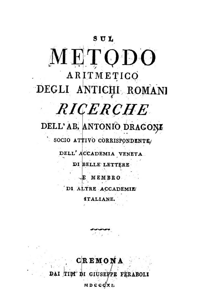 Sul metodo aritmetico degli antichi romani ricerche dell'ab. Antonio Dragoni socio attivo corrispondente dell'Accademia Veneta di Belle Lettere e membro di altre accademie italiane. - Cremona : dai tipi di Giuseppe Feraboli, 1811. - 136 p. ; 8º .